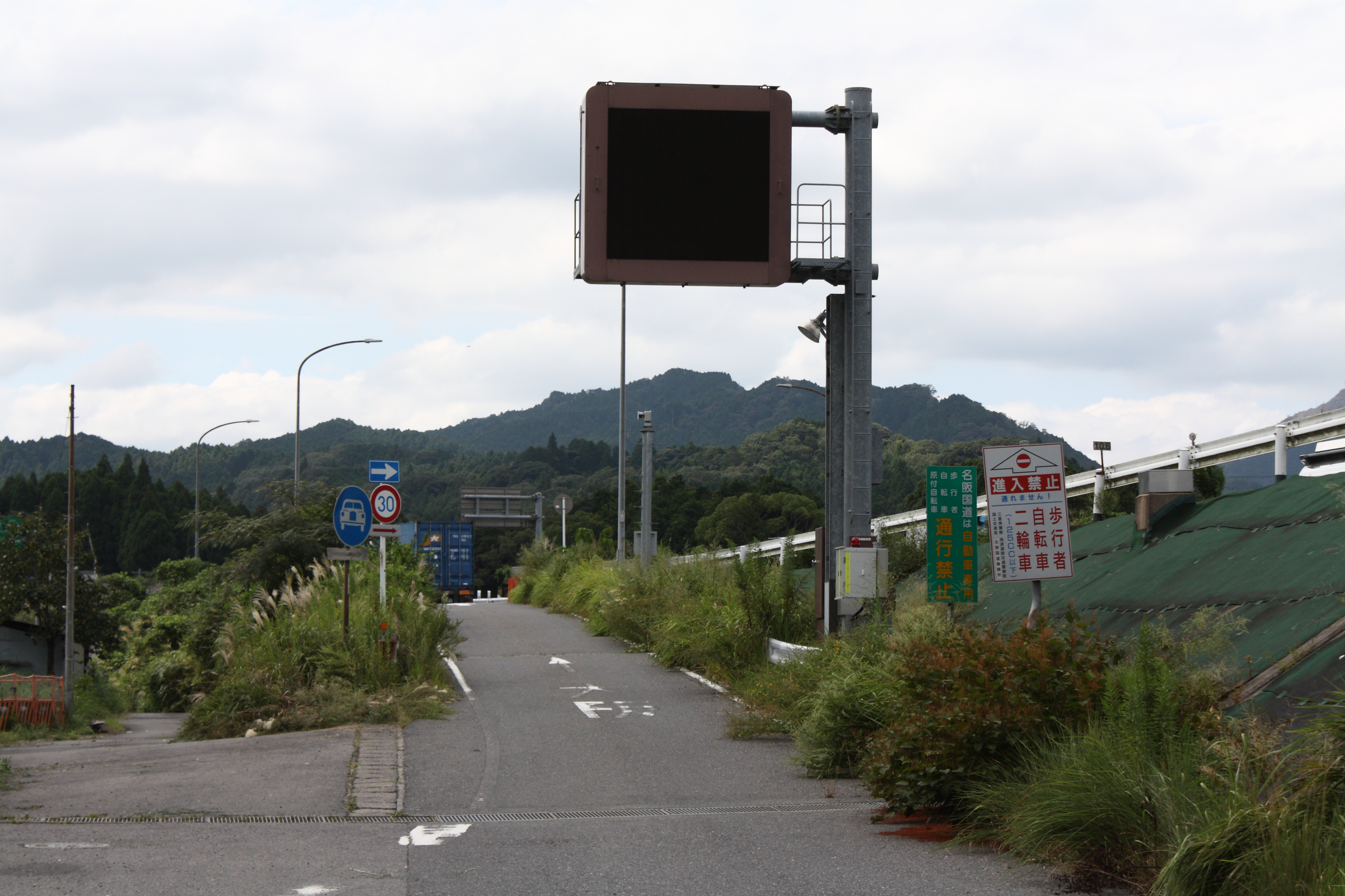 名阪国道 板屋インターチェンジ（ダイヤモンド型） 天理方面入口 三重県亀山市加太板屋